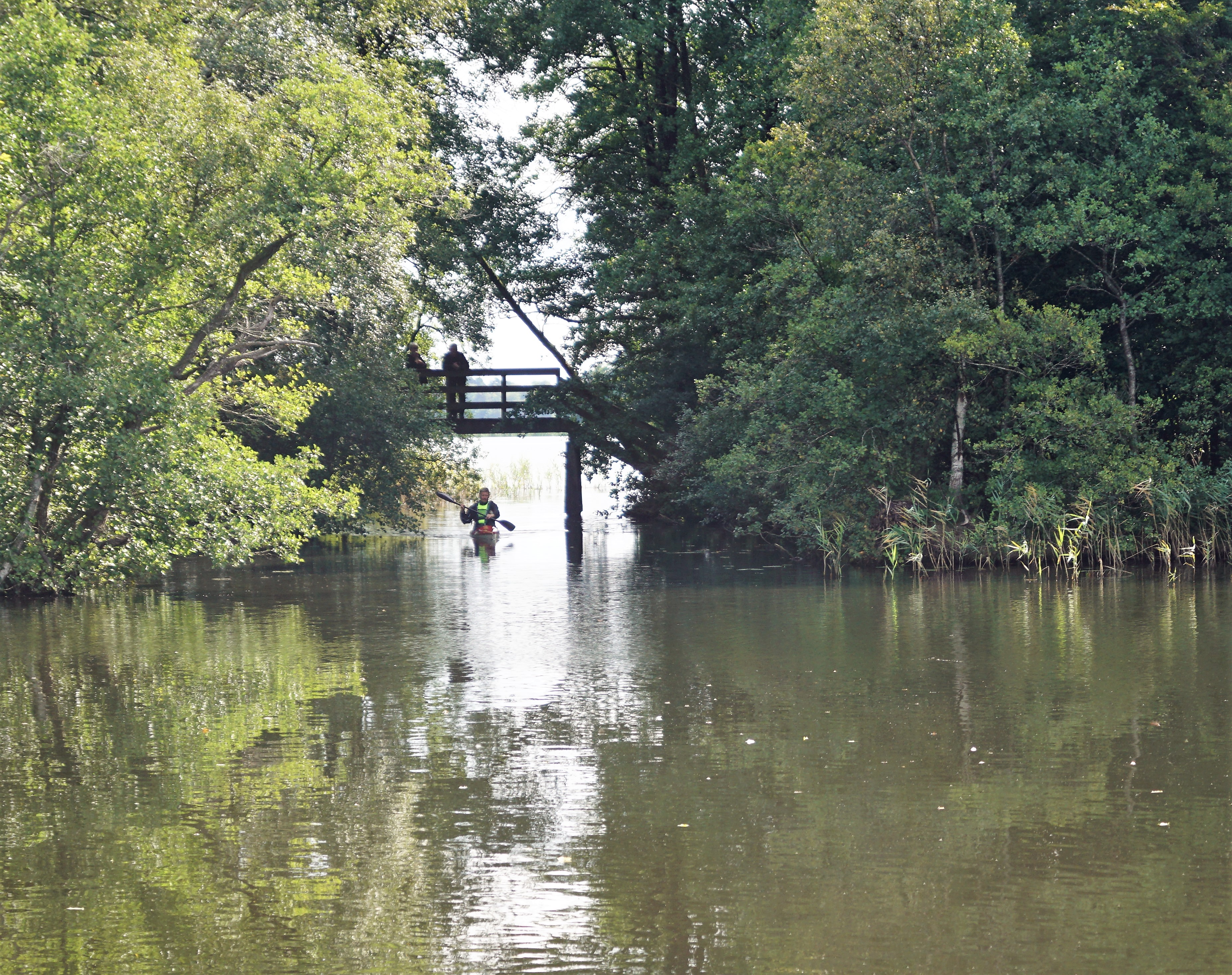 Skovridderens Bro set fra nordvest